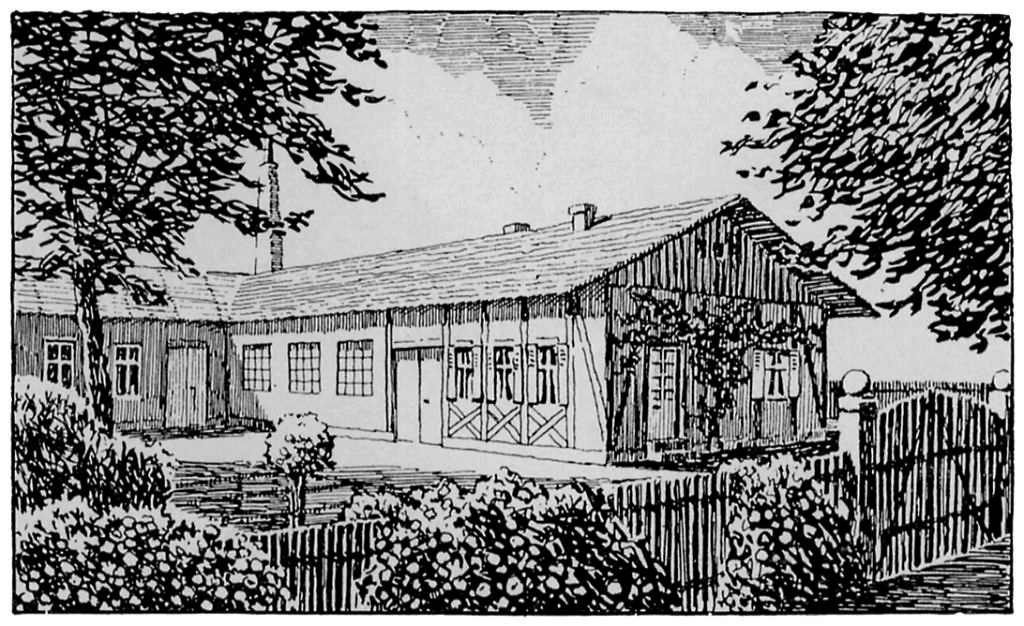 Abb. 5. Meine Werkstätte in T6, in welcher mein erster Zweitaktmotor und der erste Motorwagen entstand